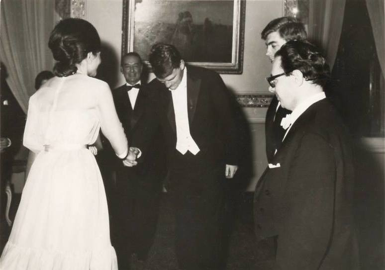 Farah Diba handshaking with violoncellist Bernhard Braunholz in the Marble Palace in Tehran, 1965. On the right: Volker Kirchner (viola) and Günter Kehr (violin, Kehr-Trio Mainz).